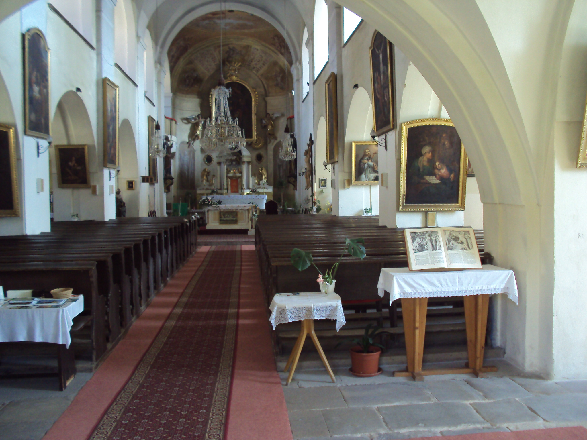 Vnitřek mimoňského kostela